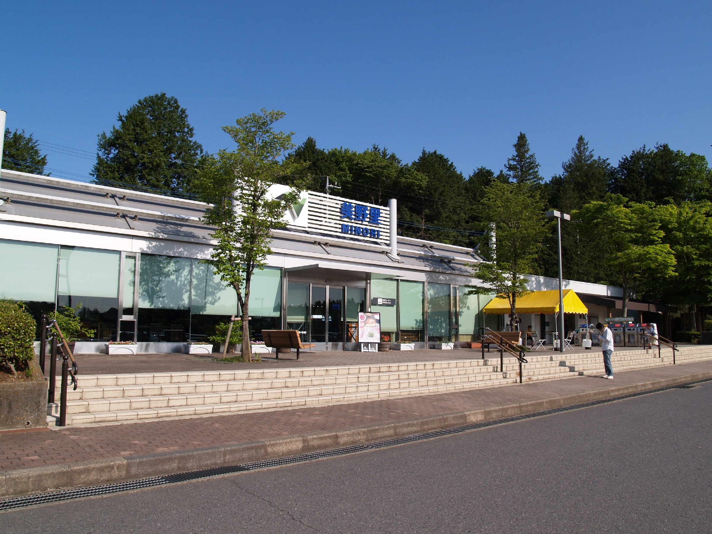 美野里パーキングエリア上り線施設